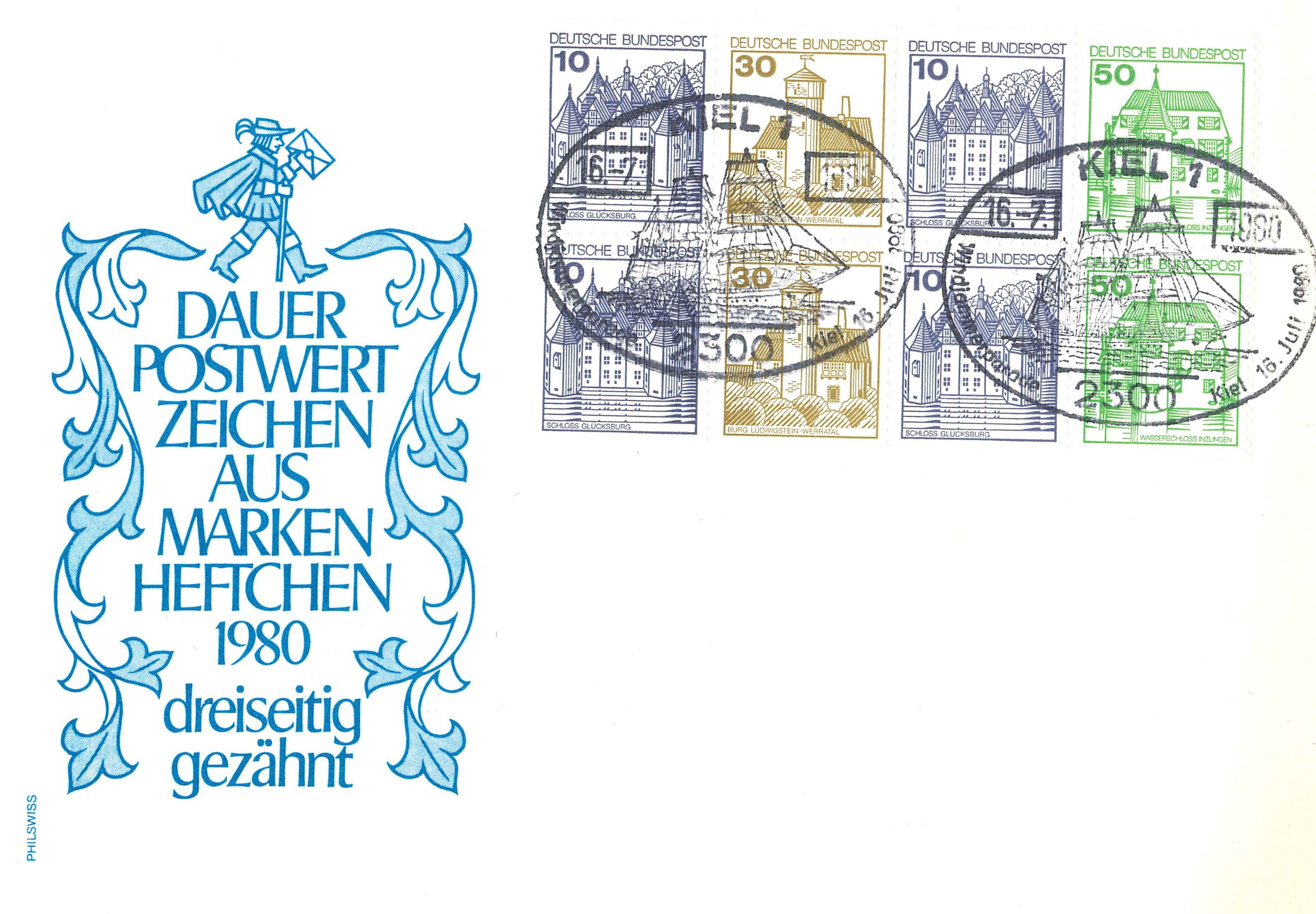 Dauerpostwertzeichen der Deutschen Bundespost (1980)